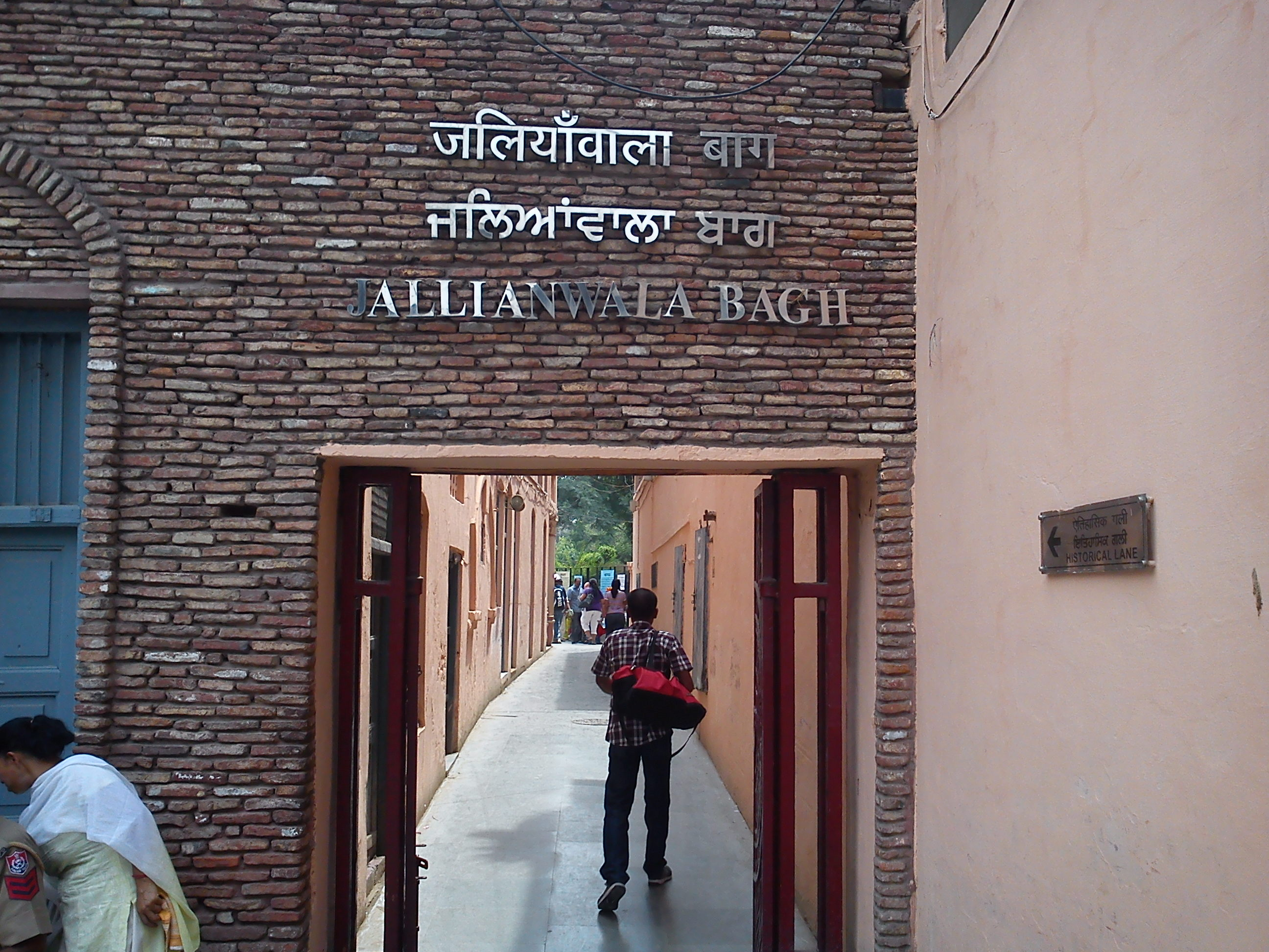 ജാലിയാം_വാലാ_ബാഗ്-കവാടം